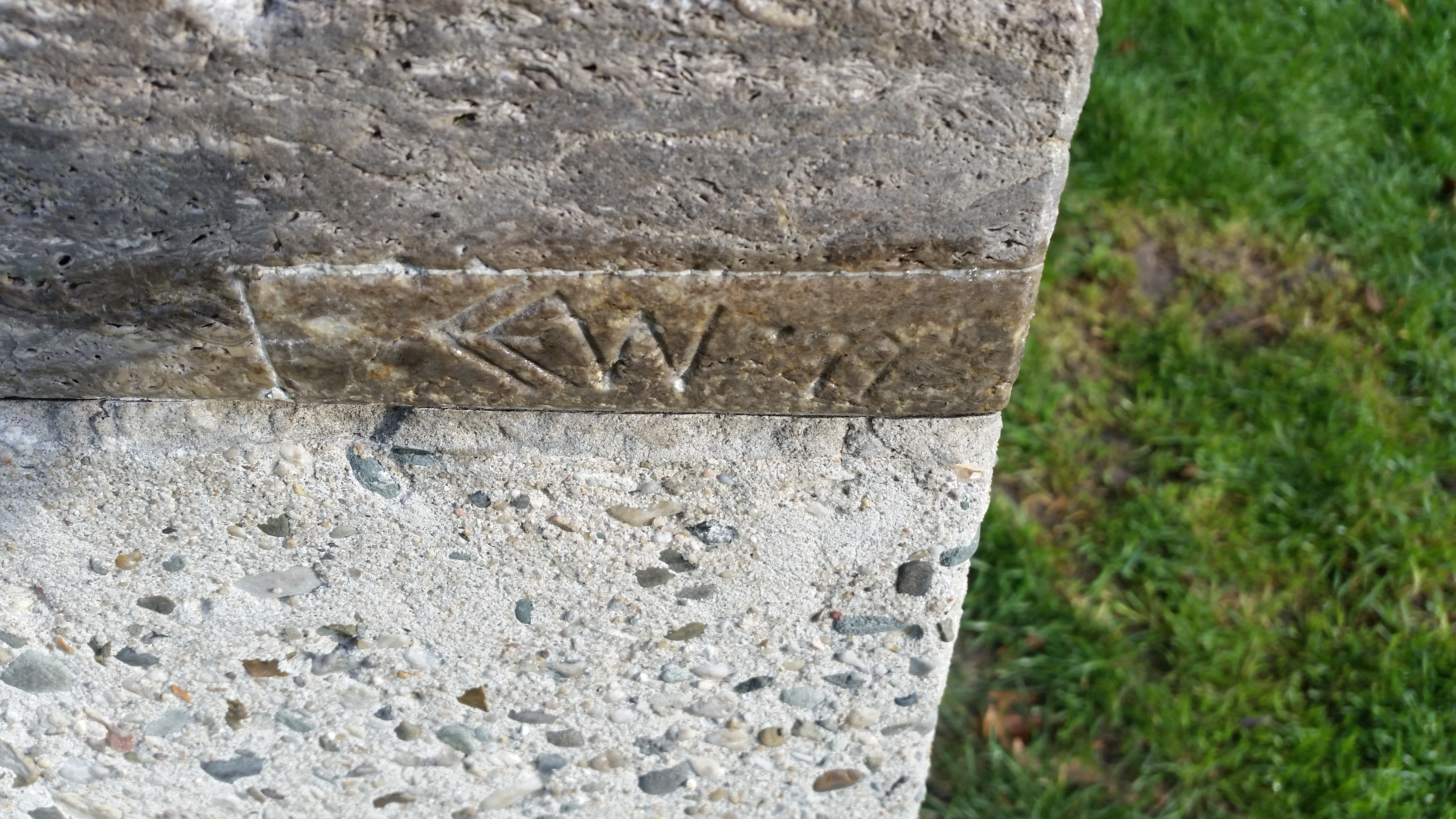 Signatuur van Spelende hond in Beatrixpark